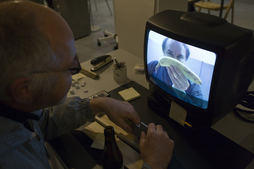 Heinrich Gartentor: Video zur "Künstlerischen Qualitätserfassung". Präsentationsansicht bei "BürokARTie" in Münster, 2009.